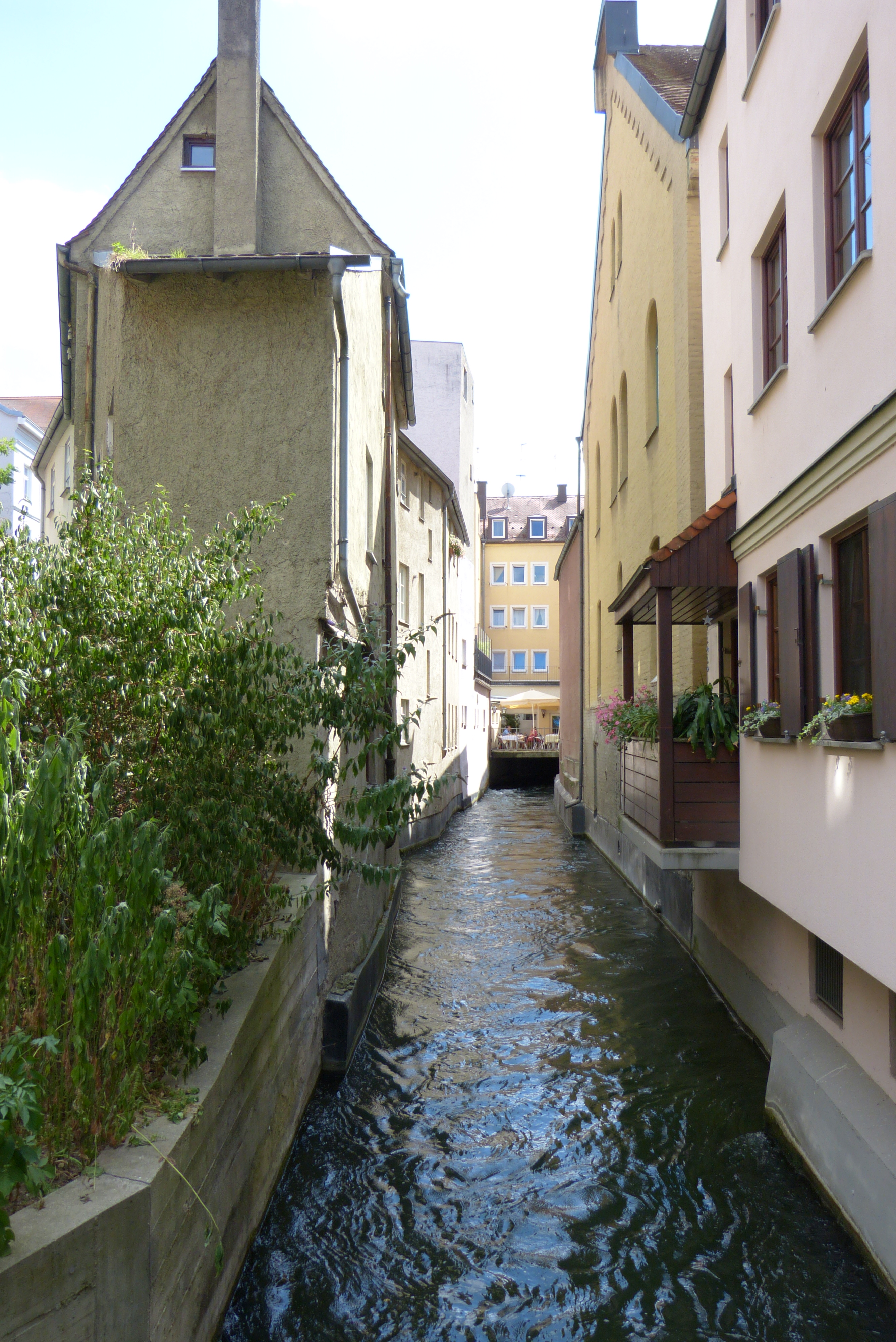 Mittlerer Lech in Augsburg, Auf dem Rain